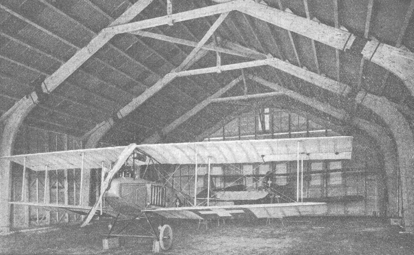 Inserat für Hallen in hetzerscher Holzbauweise mit einer Abbildung eines Hangars in Dübendorf